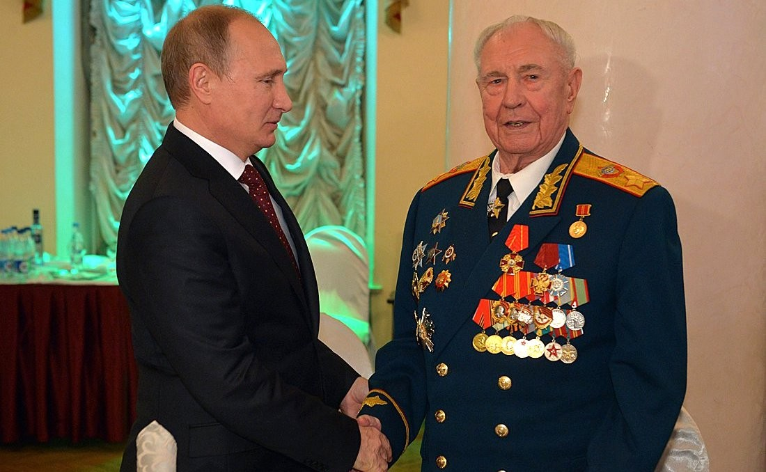 Владимир Путин поздравляет Дмитрия Язова с 90-летием